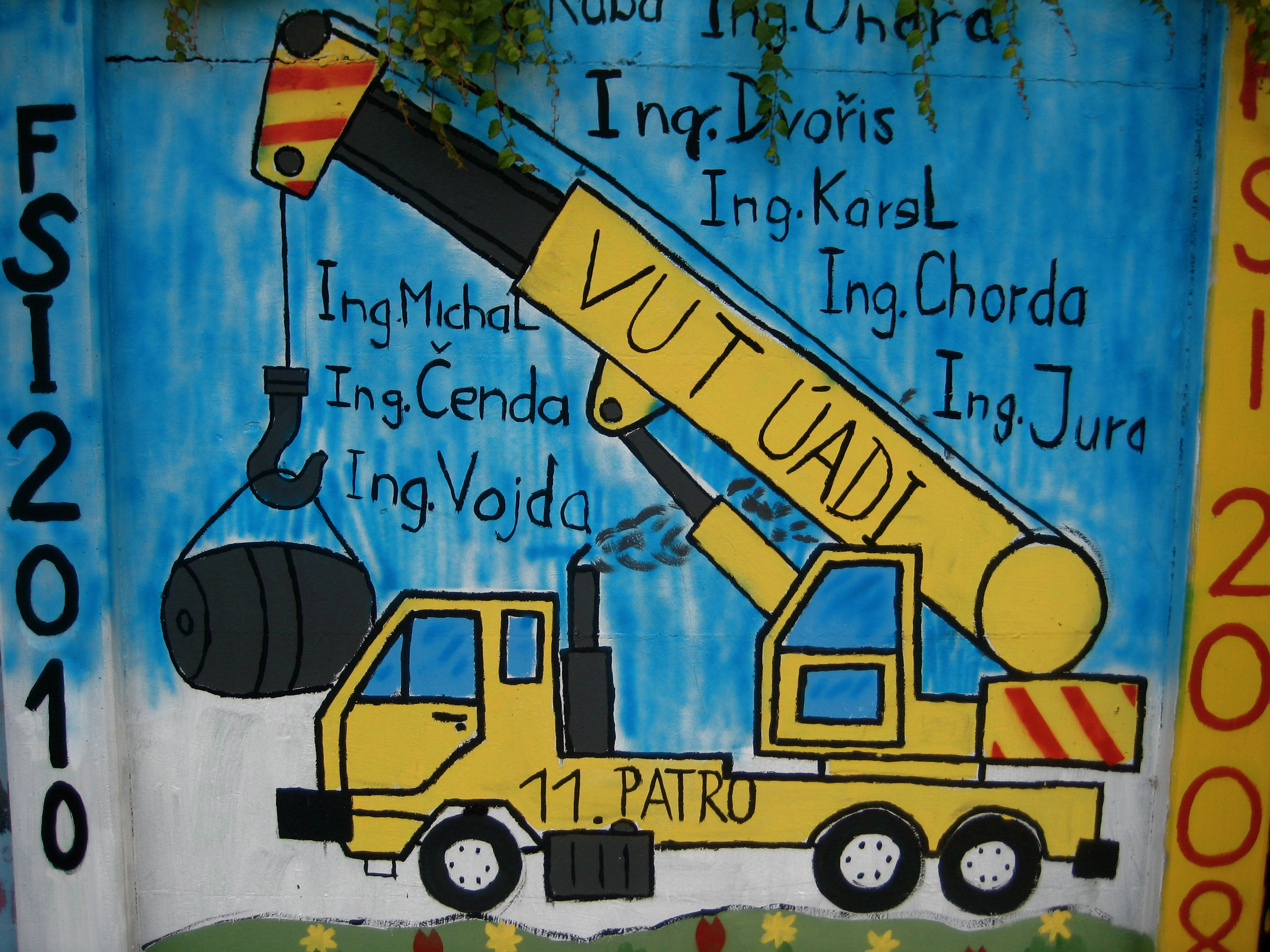 Zeď s podpisy absolventů Fakulty strojního inženýrství Vysokého učení technického v Brně v Kolejní ulici v areálu kampusu Pod Palackého vrchem